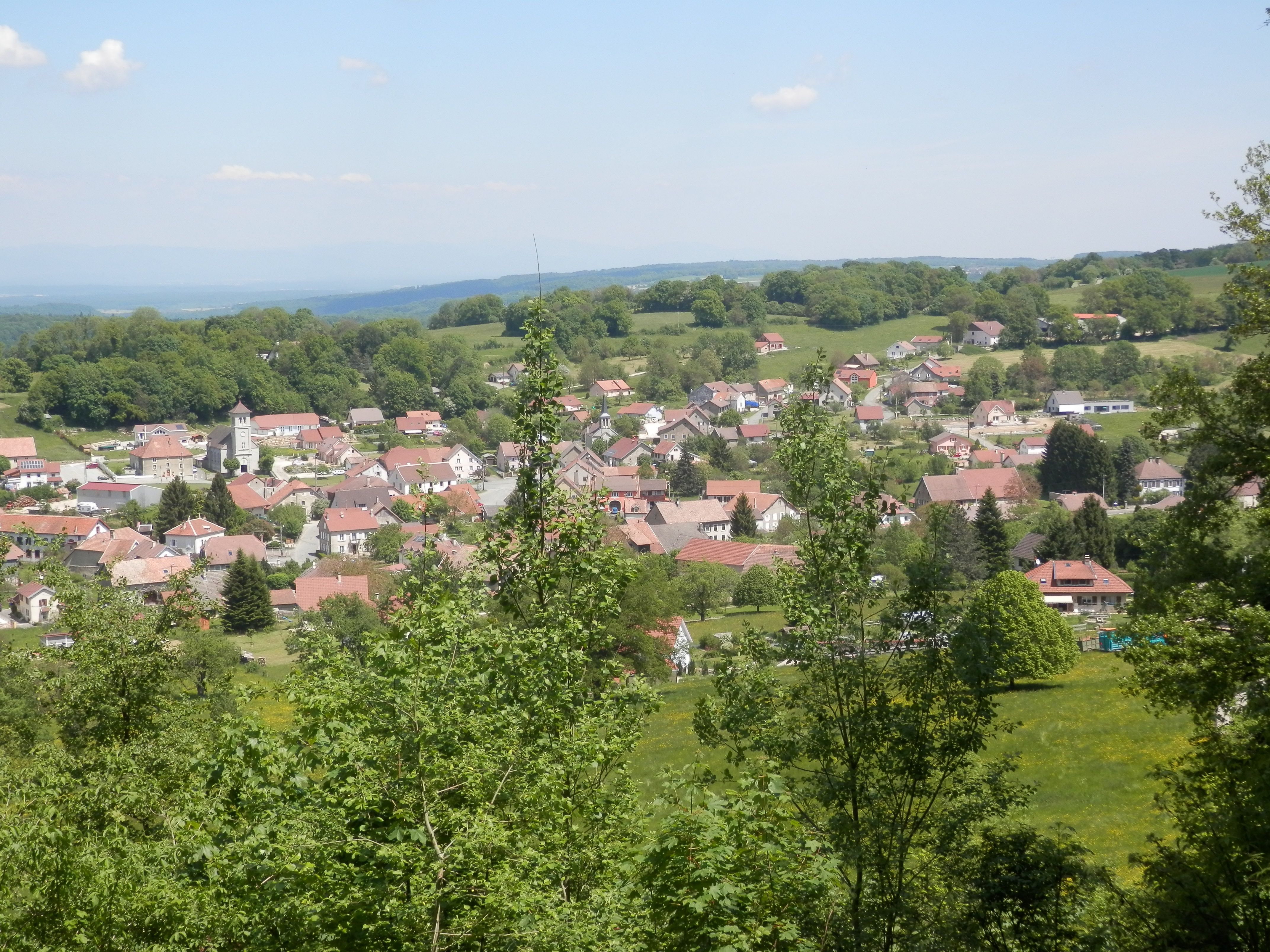 vue du village